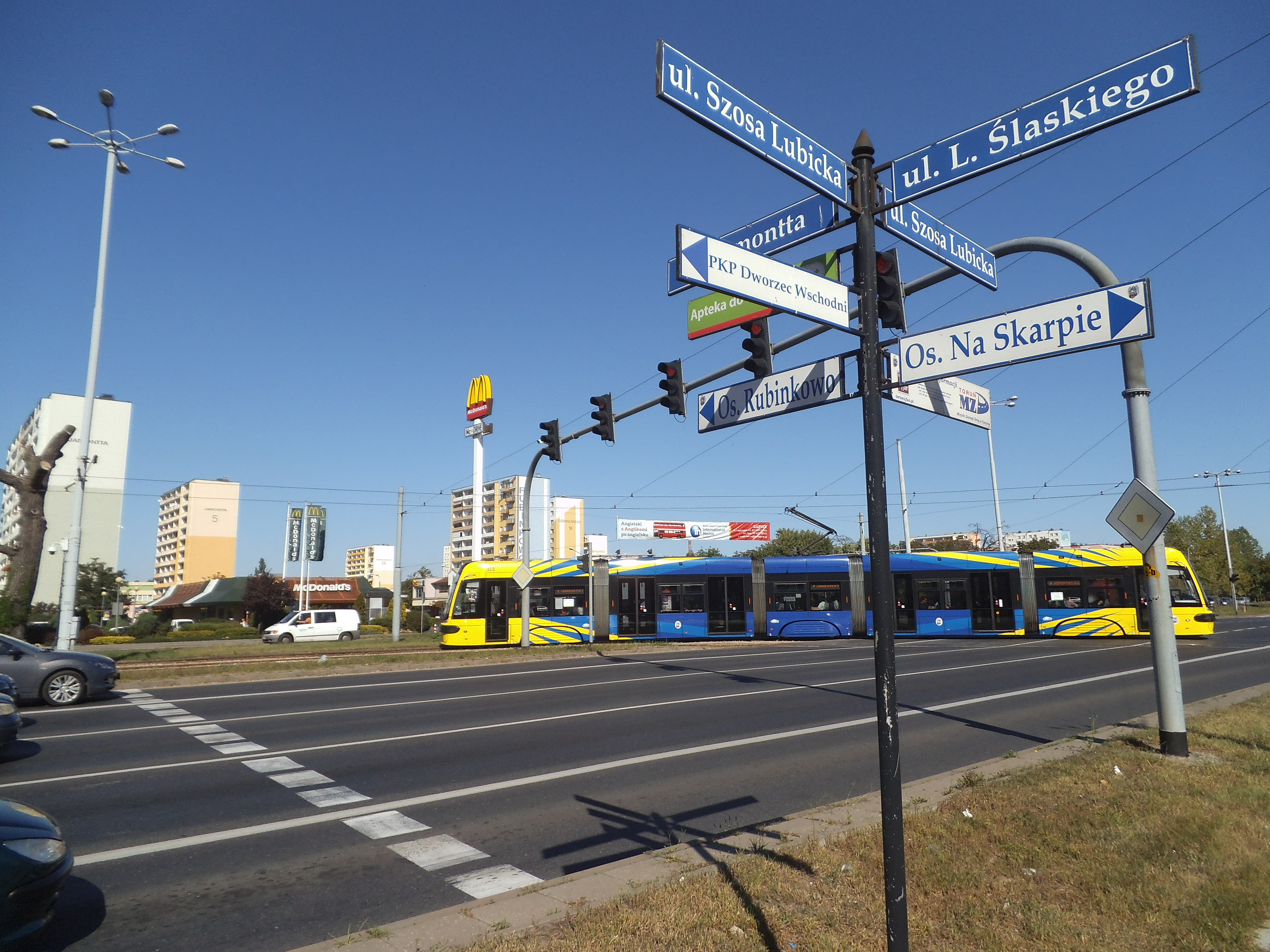 Fragment Szosy Lubickiej w Toruniu